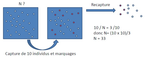 Exemple de la technique de capture-marquage-recapture